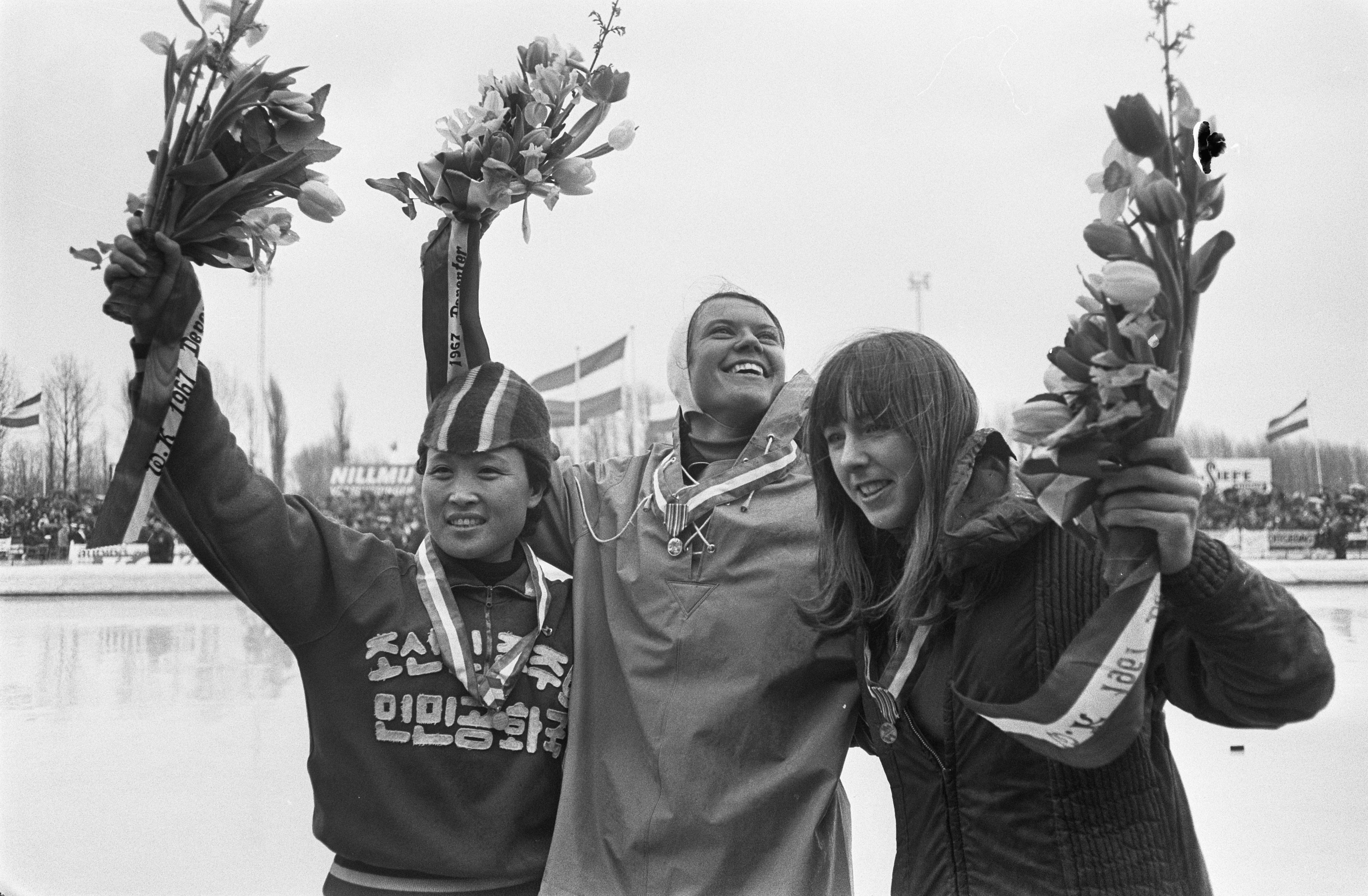 Collectie / Archief : Fotocollectie Anefo Reportage / Serie : [ onbekend ] Beschrijving : WK schaatsen te Deventer dames, huldiging 1500 meter midd Stien Kaiser , links Kim Song Soon en Diana Holum (3) Datum : 19 februari 1967 Locatie : Deventer Trefwoorden : SCHAATSEN, huldigingen, sport Persoonsnaam : Kaiser, Stien Fotograaf : Koch, Eric / Anefo Auteursrechthebbende : Nationaal Archief Materiaalsoort : Negatief (zwart/wit) Nummer archiefinventaris : bekijk toegang 2.24.01.05 Bestanddeelnummer : 920-0897